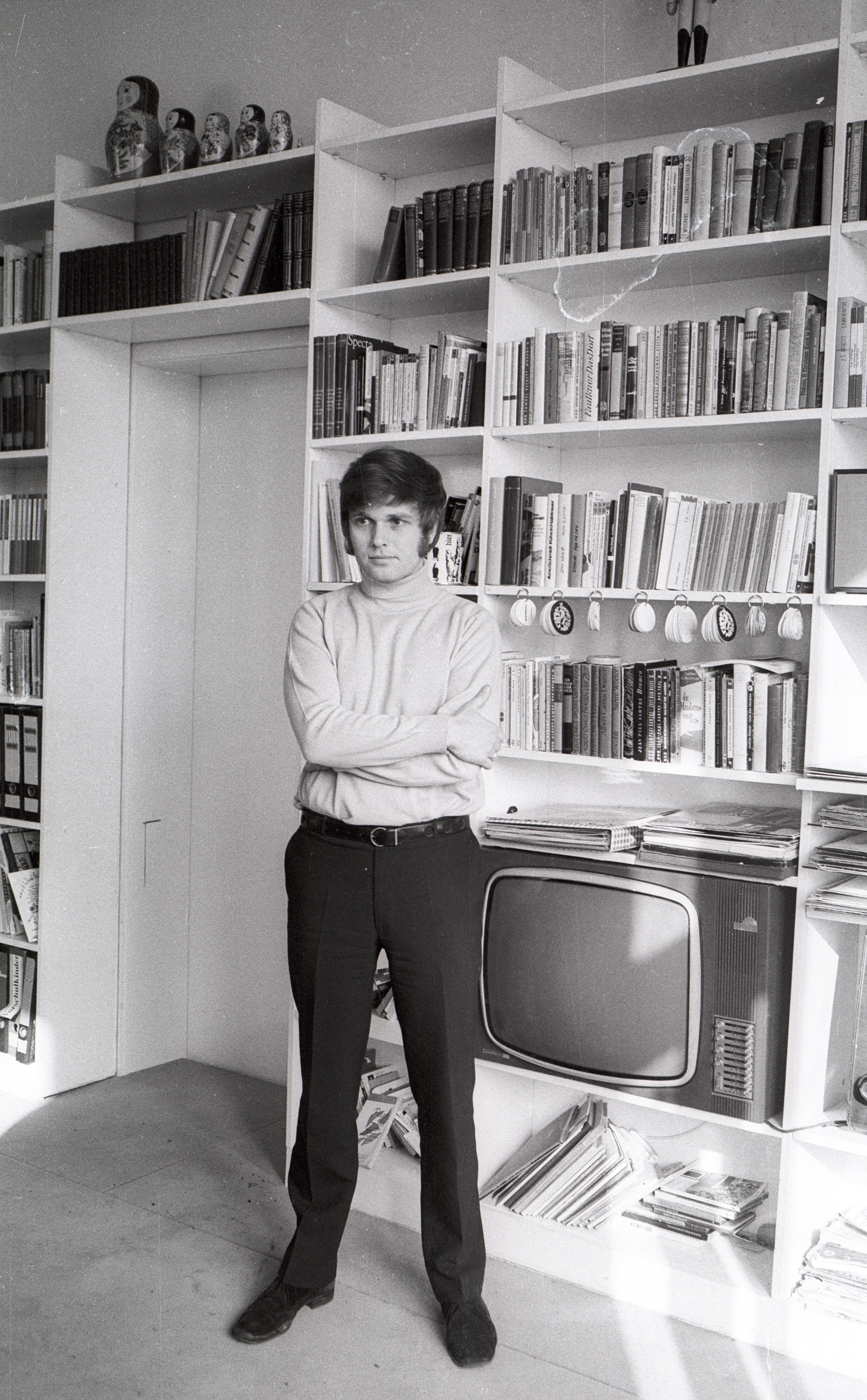 Professor Jürgen Zimmer bei Dreharbeiten zu dem Dokumentarfilm Mit Konflikten leben - Erziehung zum Frieden des NDR